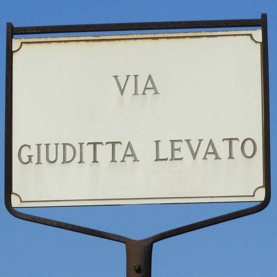 Targa stradale presso Ciampino(RM), intitolata a Giuditta Levato, contadina calabrese protagonista delle lotte per l'assegnazione del latifondo, uccisa dagli agrari durante una manifestazione nel novembre del 1946